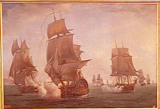 Combat des frégates La Junon et la Gentille contre le vaisseau anglais l'Ardent (17 aout 1779) par Pierre-Julien Gilbert [1783-1860], Versailles ; hôtel de la préfecture des Yvelines)